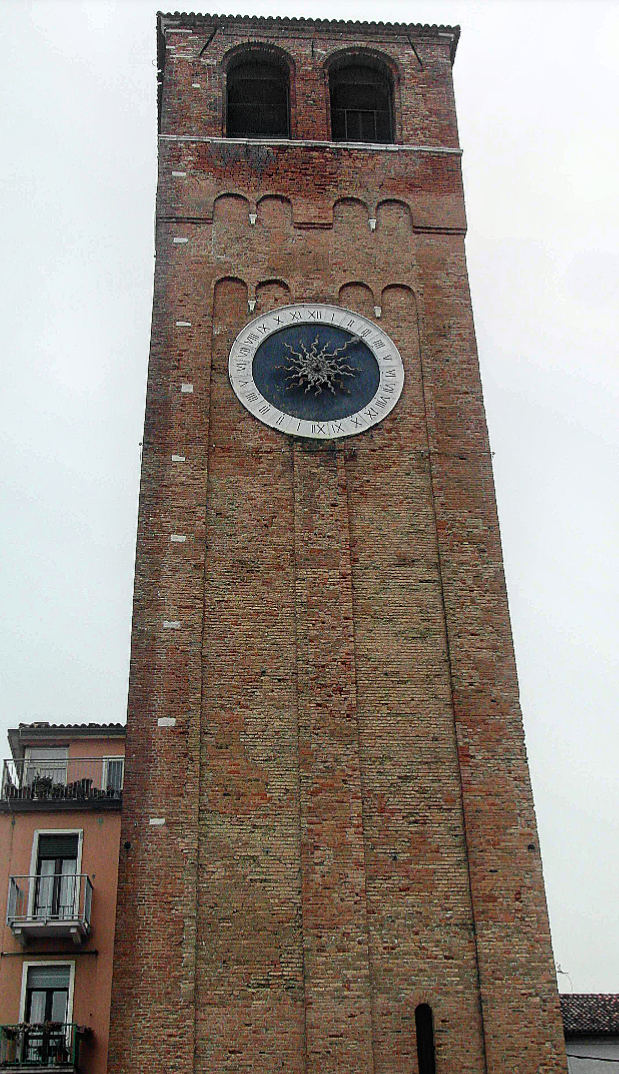 Torre Sant'Andrea